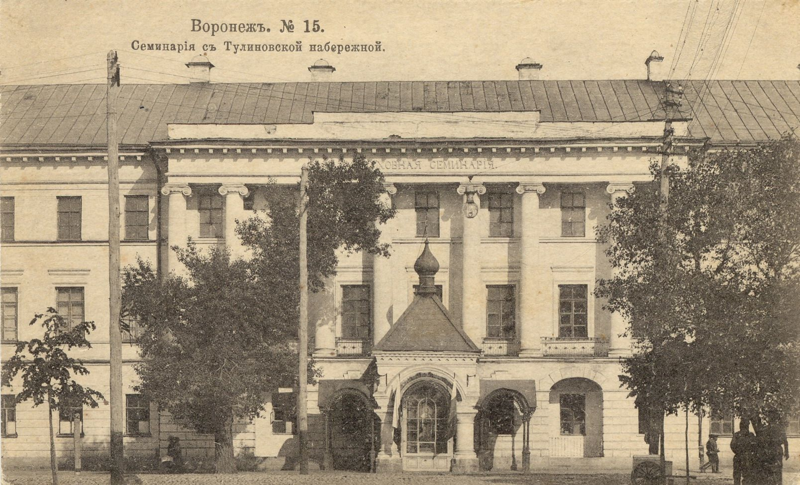 Воронежская духовная семинария с Тулиновской набережной